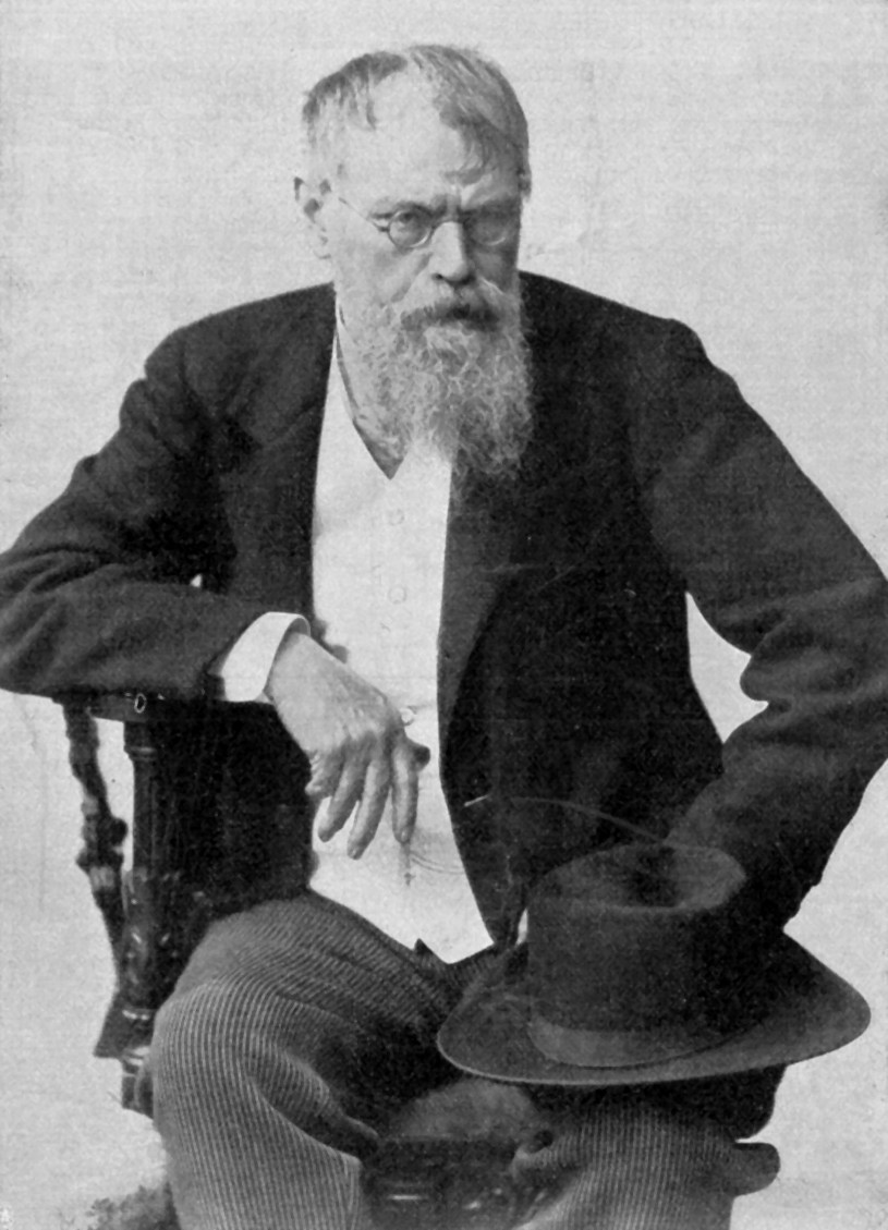 Franz von Lenbach